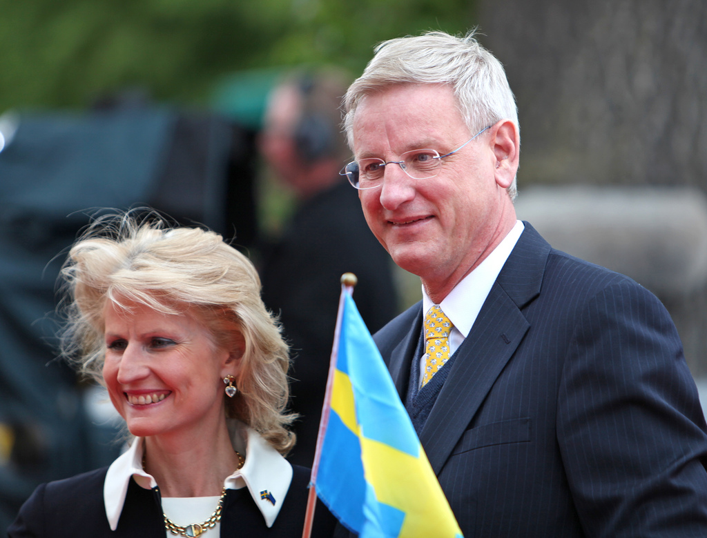 Utrikesminister Carl Bildt med fru